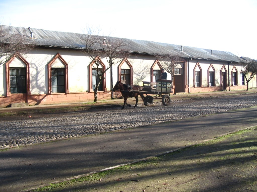 Vista Cara poniente Plaza san Ignacio de Loyola-Ñuble-Chile, se puede apreciar parte del Liceo Politécnico Maria Ward(construcción que ya no existe)